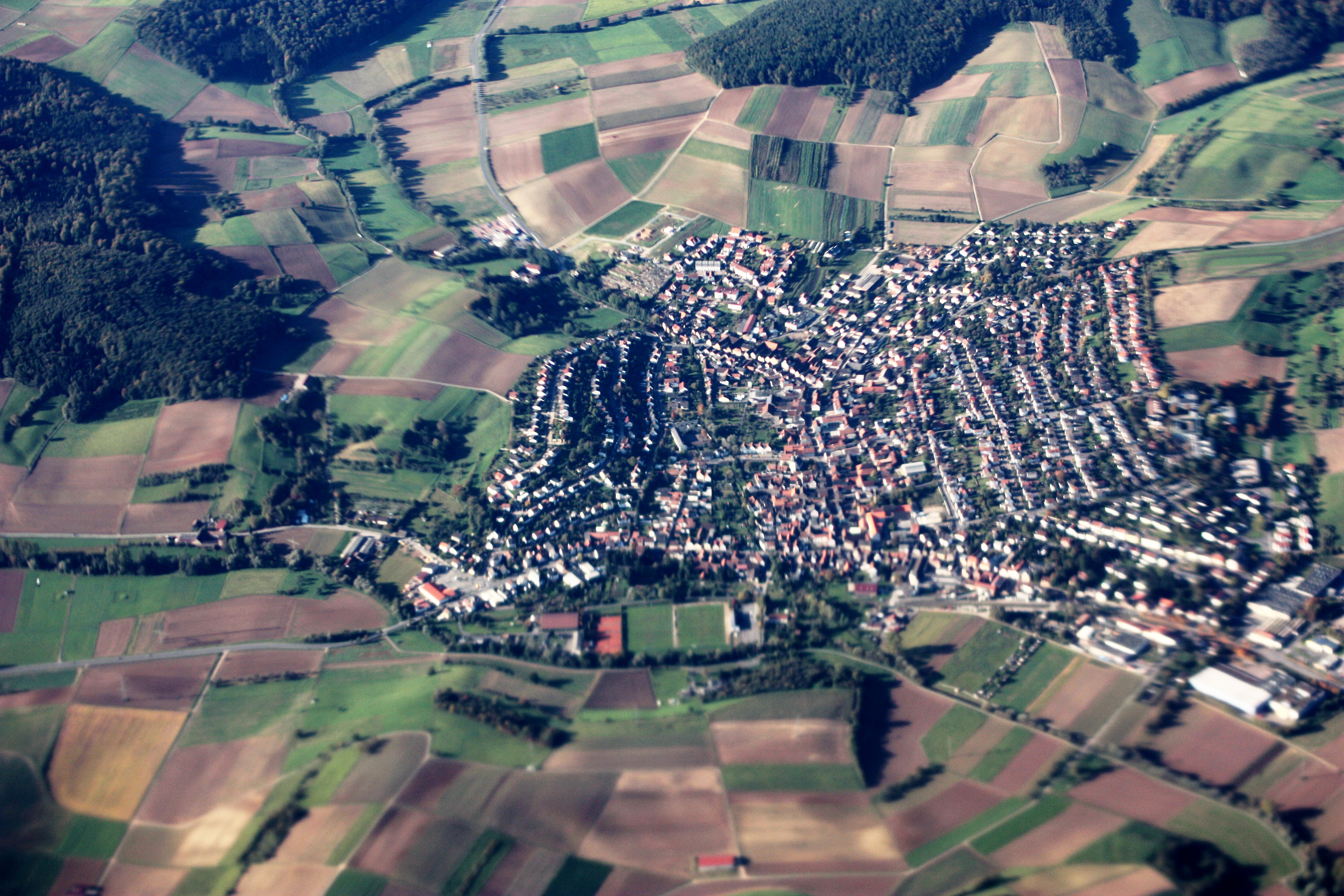 1 Flug von Frankfurt/Main nach Sofia; Start 10:12 MEZ; Landung 13:06 MEZ; Oktober 2010; Groß-Bieberau